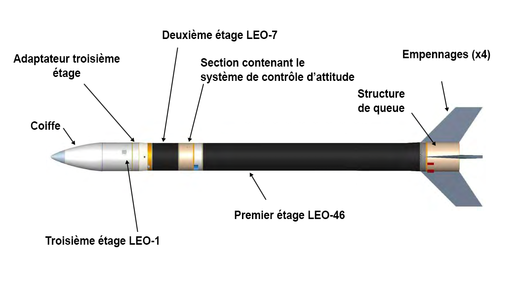 Schéma du lanceur léger américain SPARK (Spaceborne Payload Assist Rocket - Kauai) ou Super Strypi